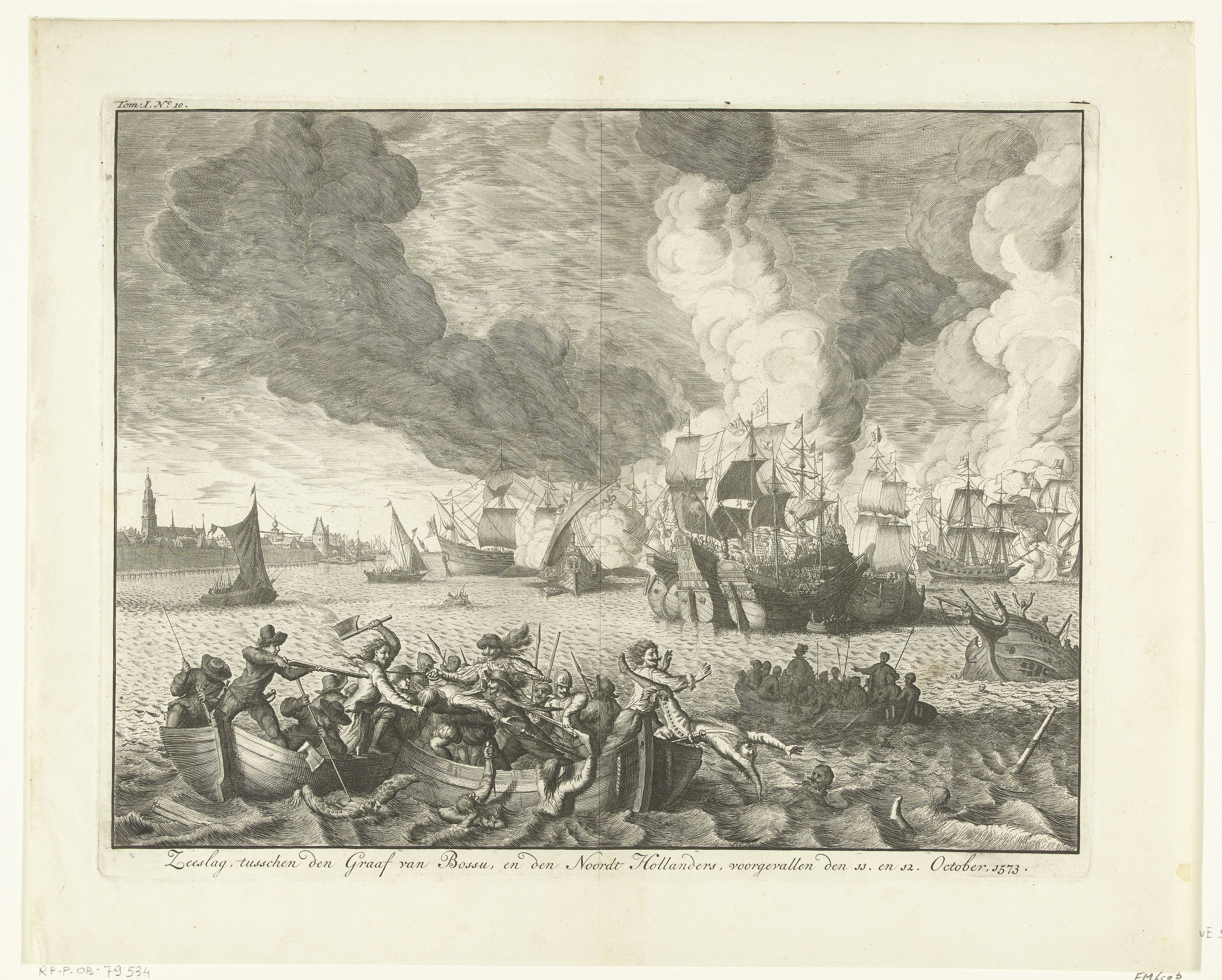 Slag op de Zuiderzee tegen de graaf van Bossu, 1573, Jan Luyken, 1730. Identificatie Titel(s)Slag op de Zuiderzee tegen de graaf van Bossu, 1573 Zeeslag, tusschen den Graaf van Bossu, en den Noordt Hollanders, voorgevallen den 11. en 12. October, 1573 (titel op object) Objecttypeprent historieprent ObjectnummerRP-P-OB-79.534 Catalogusreferentie FMH 652-b Atlas van Stolk 515 Atlas van Stolk 259-12 Van Eeghen 55-4(4) Hollstein Dutch 9 OmschrijvingDe slag op de Zuiderzee, 11 oktober 1573. Zeeslag waarbij de vloot van de watergeuzen onder leiding van Cornelis Dirkszoon van Monnickendam de Spaanse vloot van Bossu verslaat. Op de voorgrond woeste gevechten van man op man in de sloepen, daarachter de grotere schepen. Links in de verte Enkhuizen. Vervaardiging Vervaardiger prentmaker: Jan Luyken naar eigen ontwerp van: Jan Luyken Plaats vervaardigingNoordelijke Nederlanden Datering1677 - 1679 en/of 1730 Materiaal en Techniek Fysieke kenmerkenets en gravure Materiaalpapier Technieketsen / graveren (drukprocedé) Afmetingenplaatrand: h 272 mm × b 349 mm Toelichting Gebruikt als illustratie in: J. le Clerc, Geschiedenissen der Vereenigde Nederlanden, sedert den aanvang van die Republyk tot op den Vrede van Utrecht in 't jaar 1713 en het Tractaat van Barriere in 't jaar 1715 gesloten, Z. Chatelain, Amsterdam 1730, 3 delen, dl. I, pl. 10.